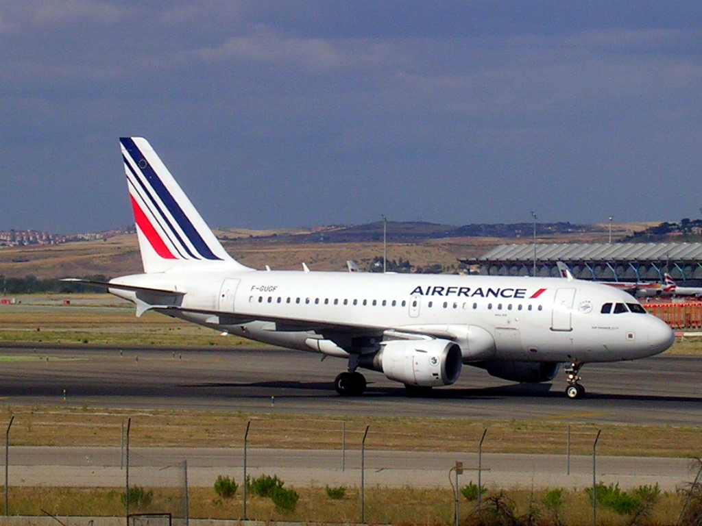 Airbus A318-111 (F-GUGF) de Air France en el aeropuerto Adolfo Suárez-Madrid Barajas.